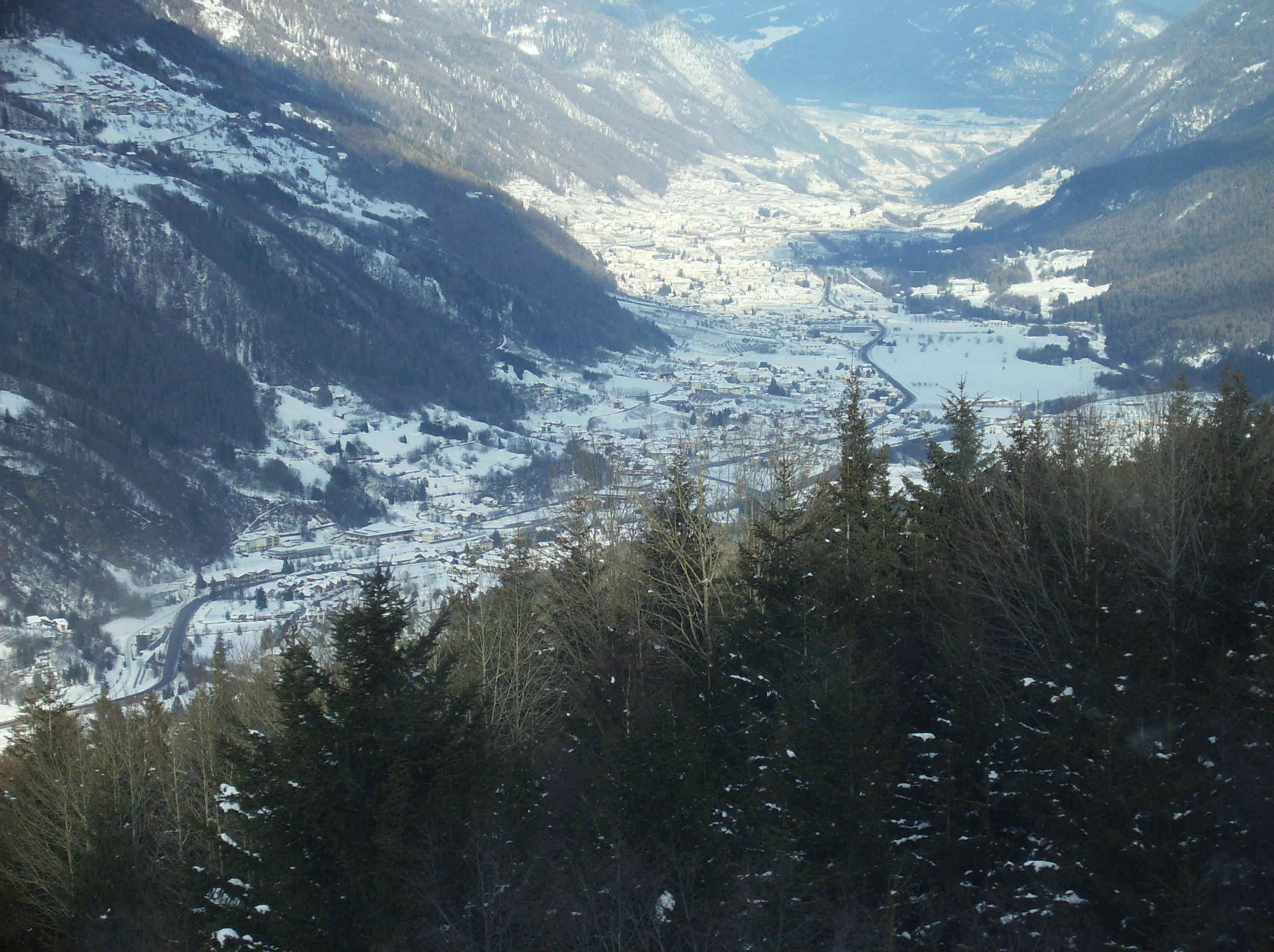 Vallée de la Noce - Val di Sole - Trento - Italie